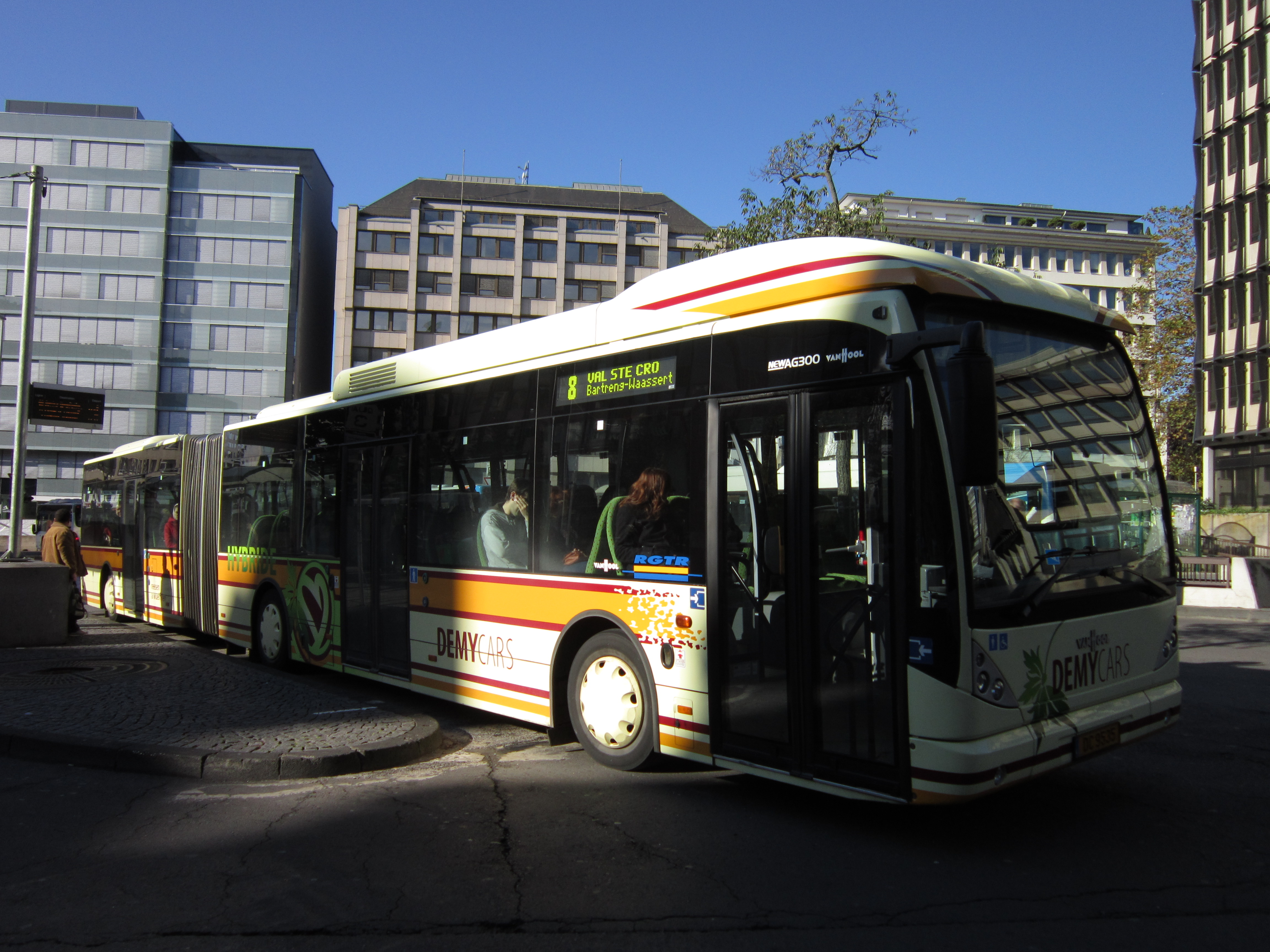 Autobus privé effectuant la desserte de la ligne 8 à Luxembourg.